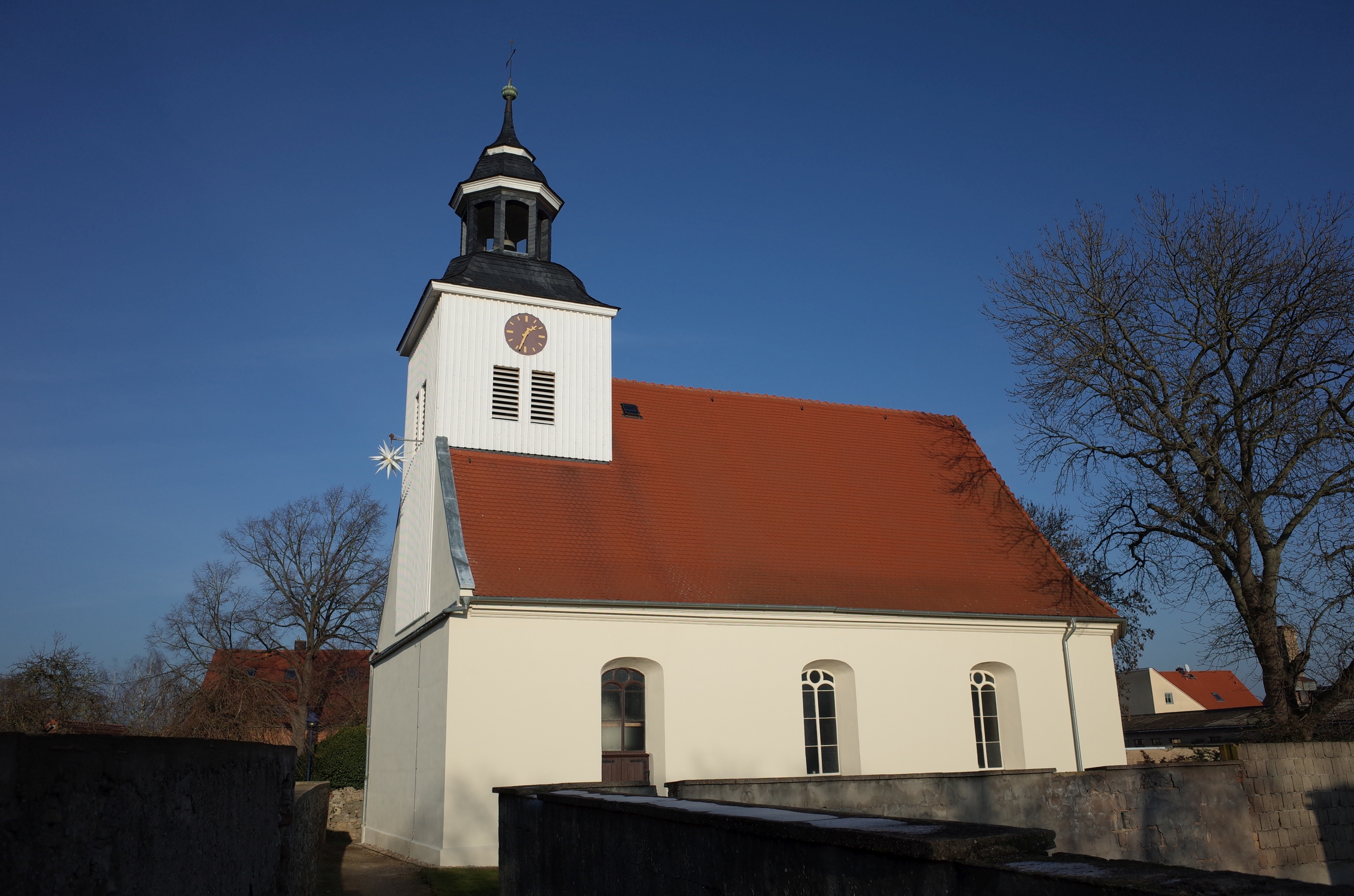 Nienburg (Saale), Ortsteil Latdorf, Kirche St. Laurentius. (Baudenkmal im Denkmalverzeichniss Sachsen-Anhalt, Erfassungsnummer: 094 60781 000 000 000 000 [1])